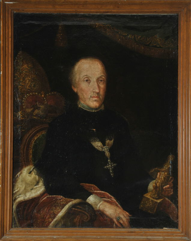 Kemptener Fürstabt Castulus von Reichlin-Meldegg (1793-1802)